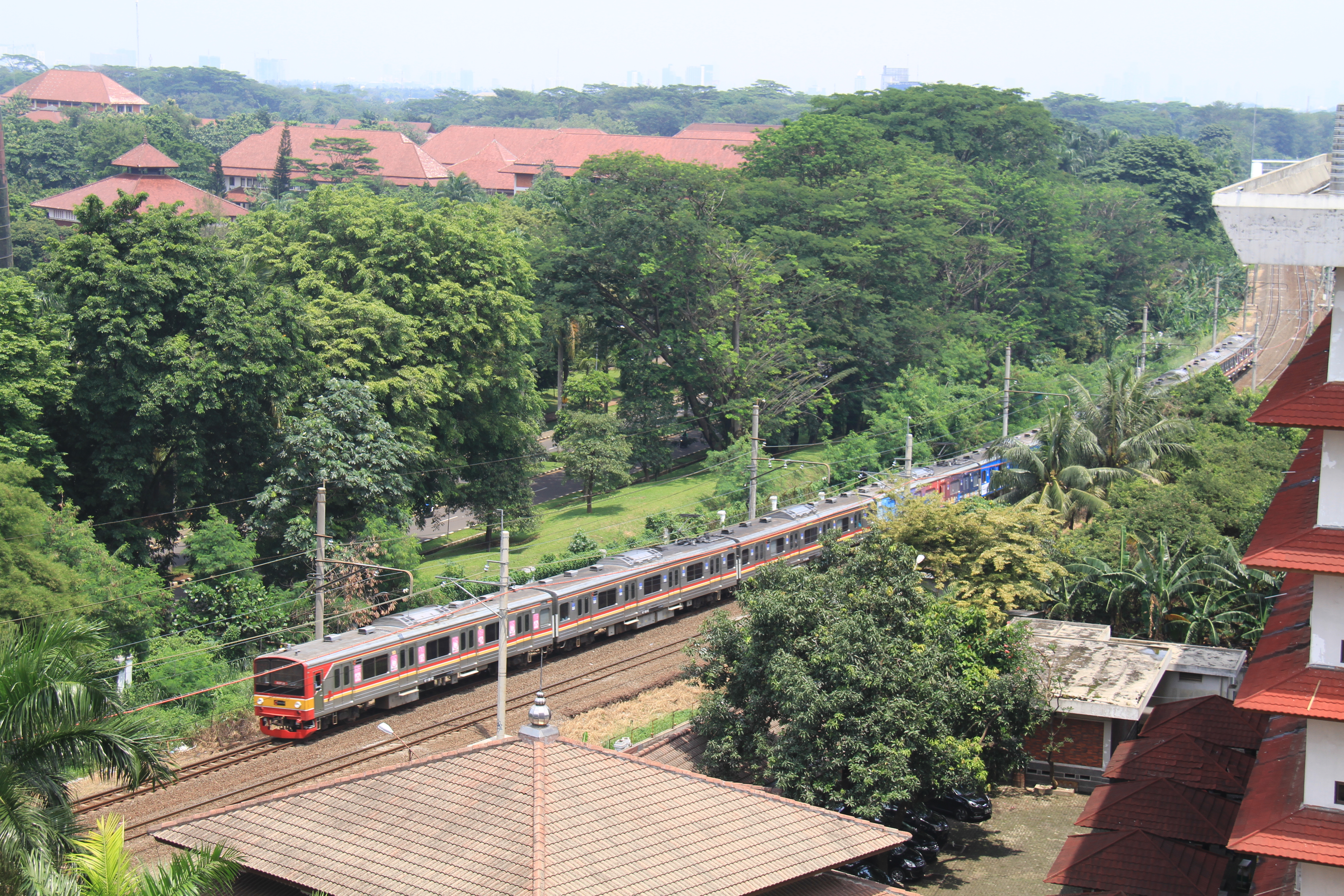 KRL seri 205 memasuki Stasiun Pondok Cina